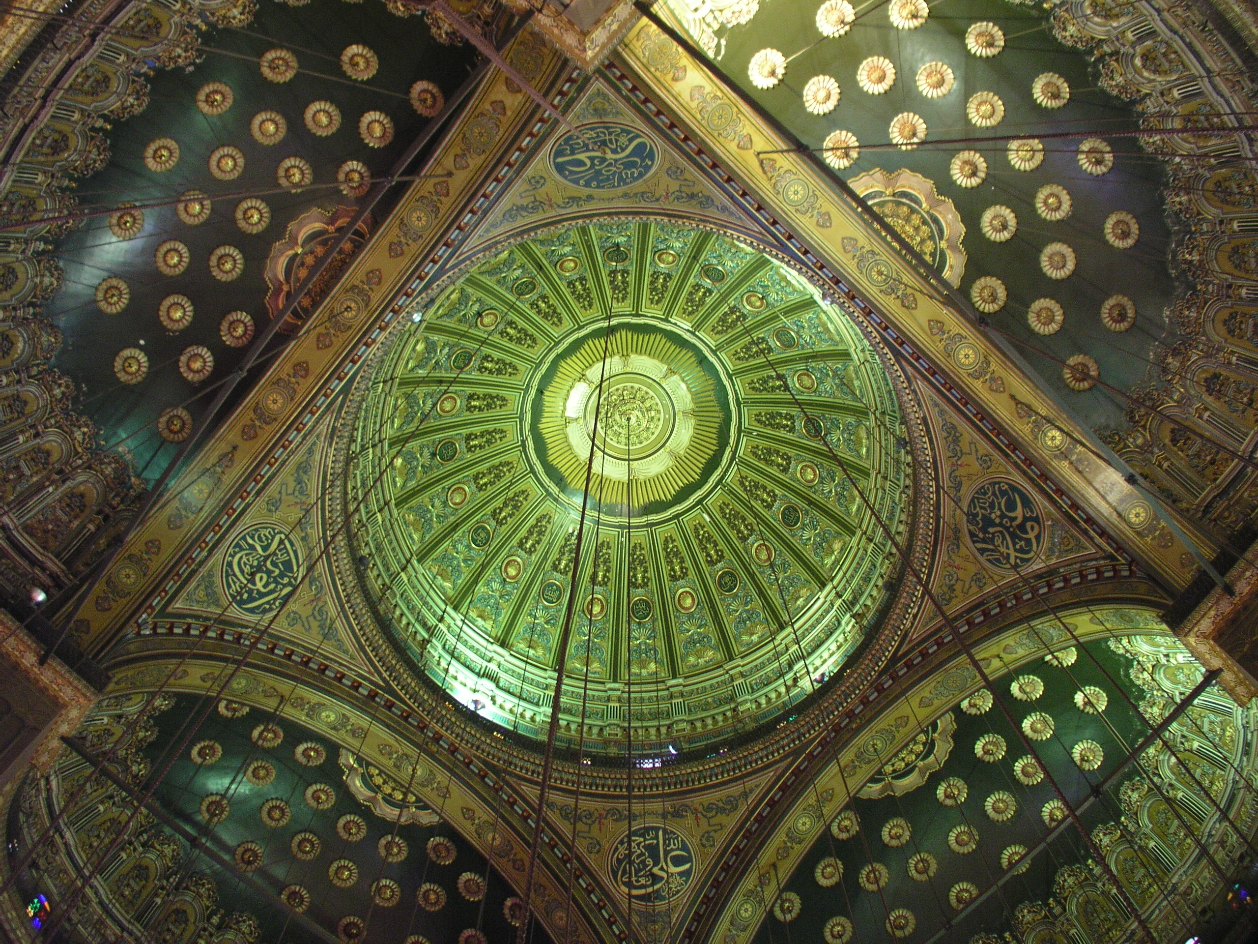 Alabastermoschee Kuppel Olympus C-5050Z